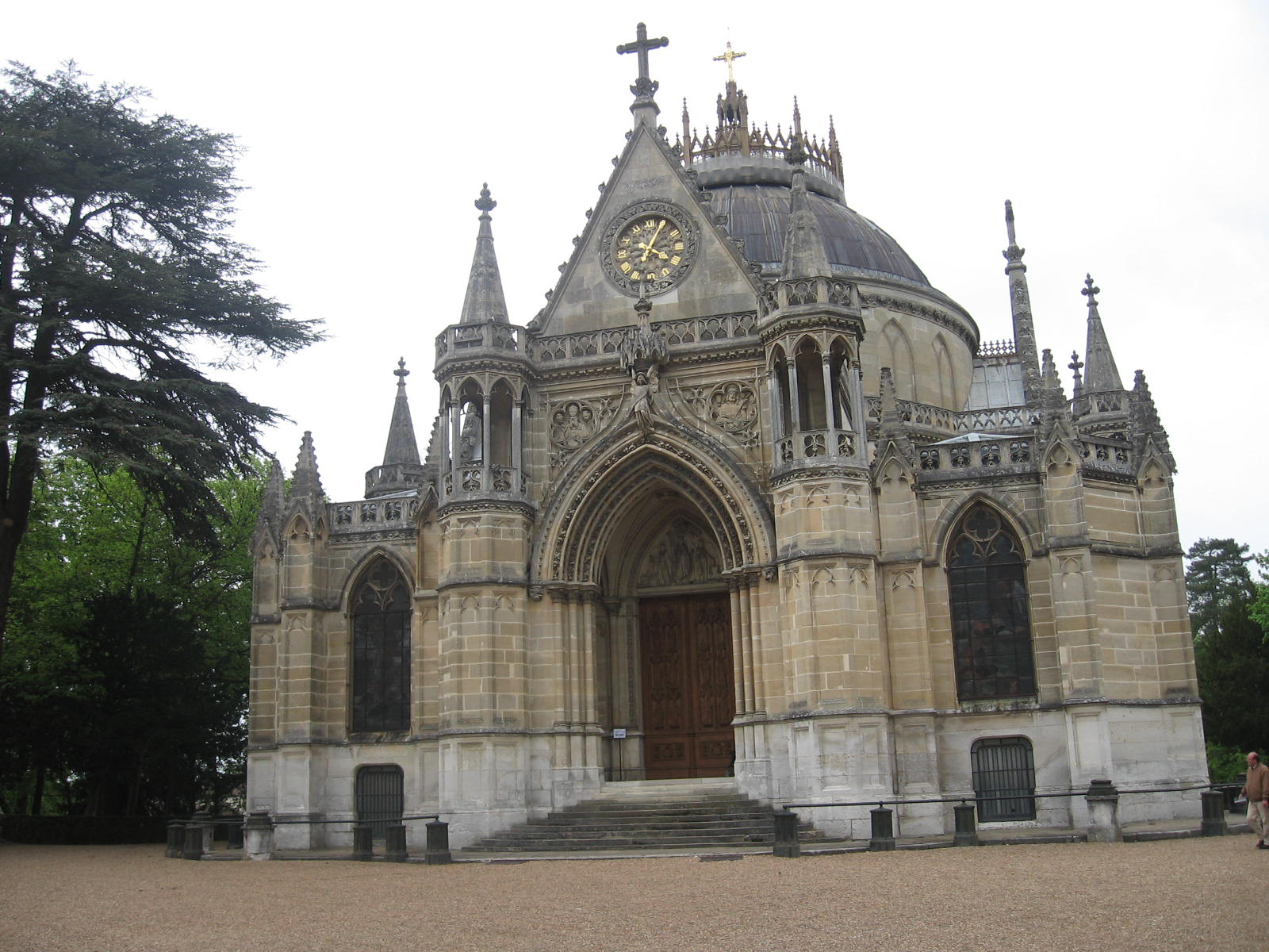 Chapelle royale de Dreux (façade)